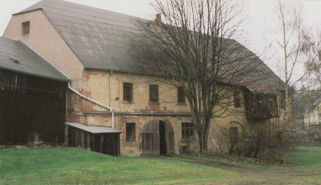 Rittergut Erkersreuth bei Selb, Nebengebäude